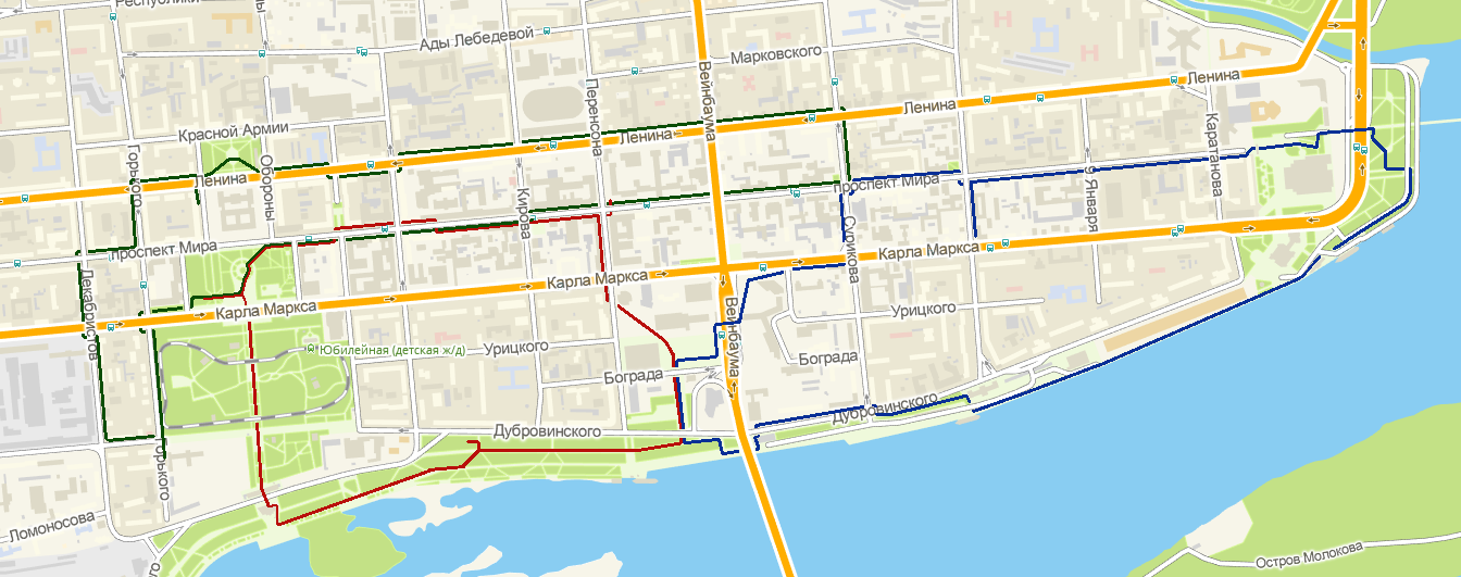 На рисунке изображены схемы исторического (синий), познавательного (зелёный) и романтического (красный) туристических маршрутов, разработанных в рамках проекта "Нити Красноярска".